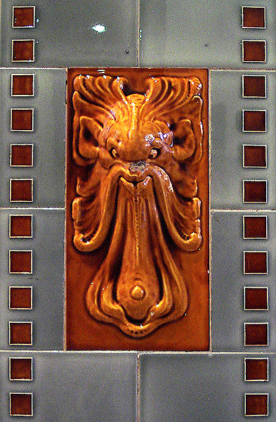 Interior do Museu de Arte do Rio Grande do Sul, Porto Alegre, Brasil. Azulejos decorativos do saguão.